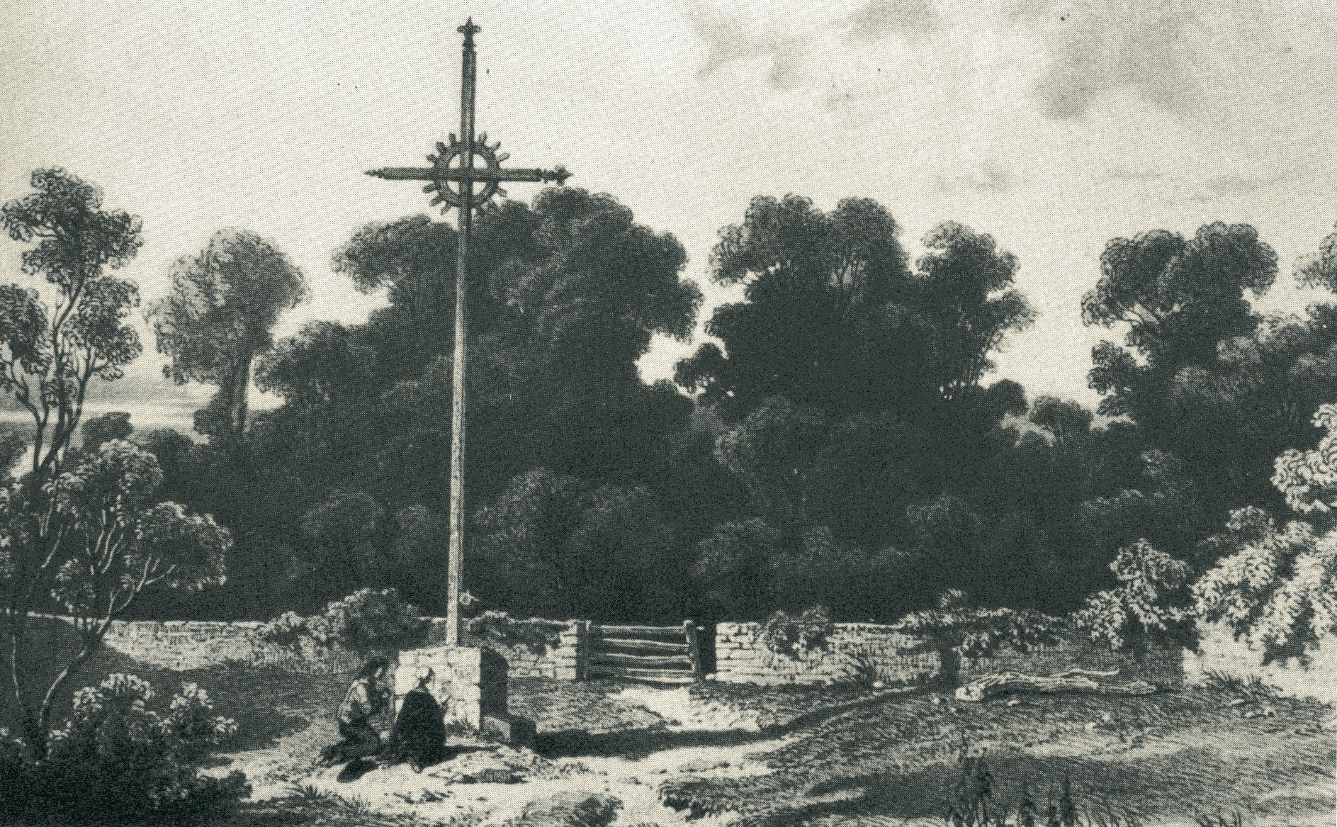 Forêt de Vezins, le "Cimetière des martyrs".